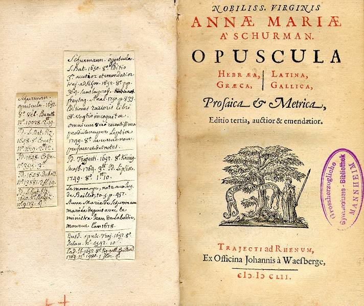 Doppelseite aus "Opuscula Hebraea, Graeca, Latina, Gallica, Prosaica et Metrica" von Anna Maria Schürmann. Text: Nobiliss. Virginis ANNAE MARIAE Á SCHURMAN. OPUSCULA Hebraea, Latina, Graeca, Gallica, Prosaica & Metrica, Editio tertia, auctior & emendatior. (Athena unter einem Baum, text:) ET FLORE ...ET FRUCTU. Trajecti ad Rhenum, Ex Officina Johannis à Waesberge, MDCLII. Innentitel.